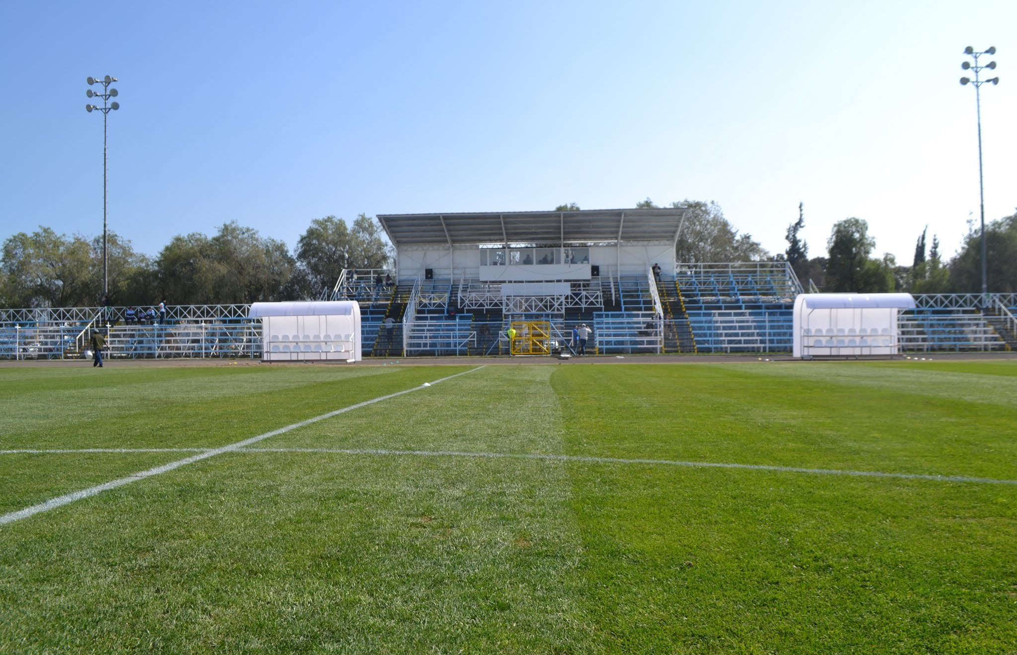 Estadio Municipal de San Bernardo, Chile